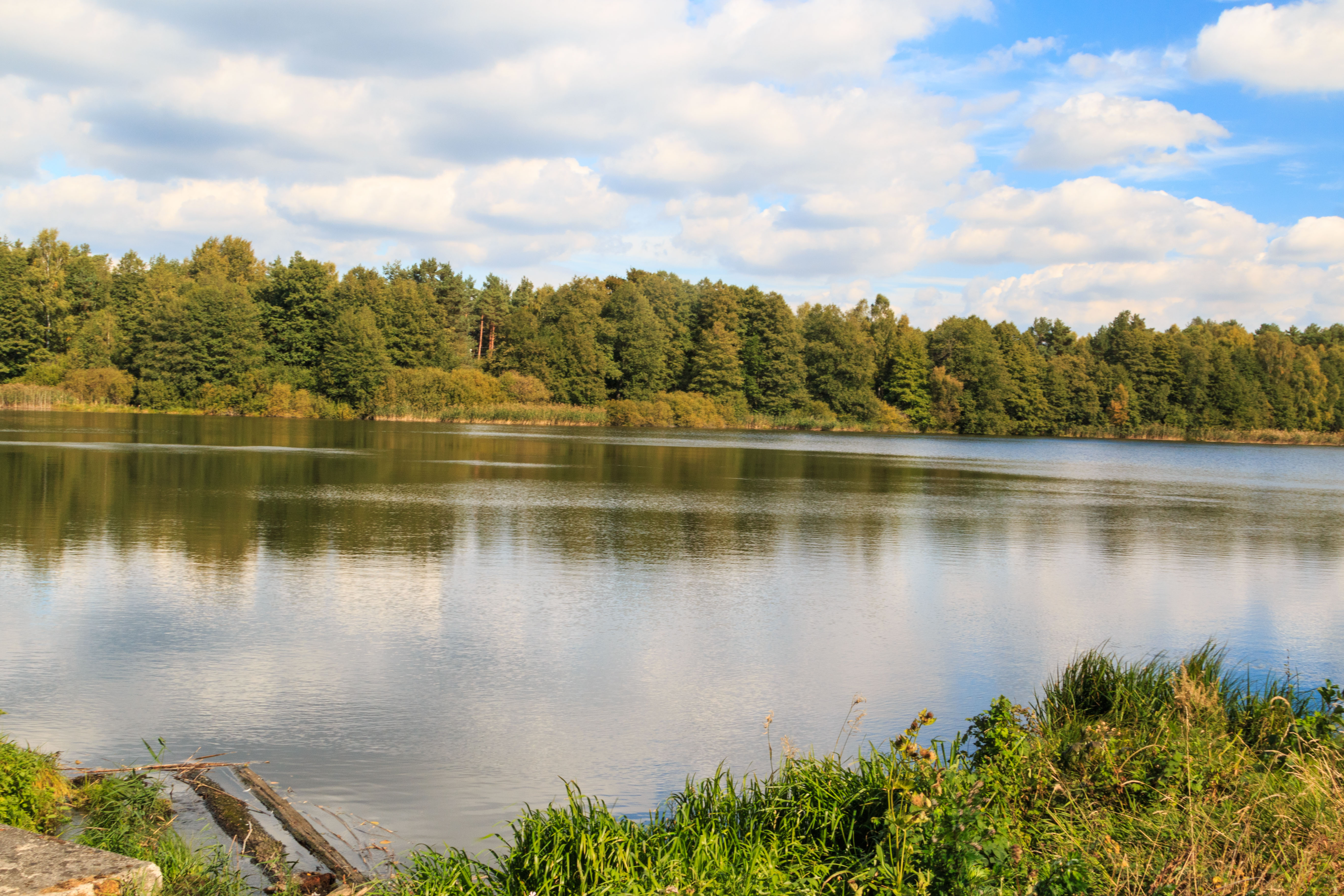 Ploužnický rybník u Hvězdova Project: Vodstvo